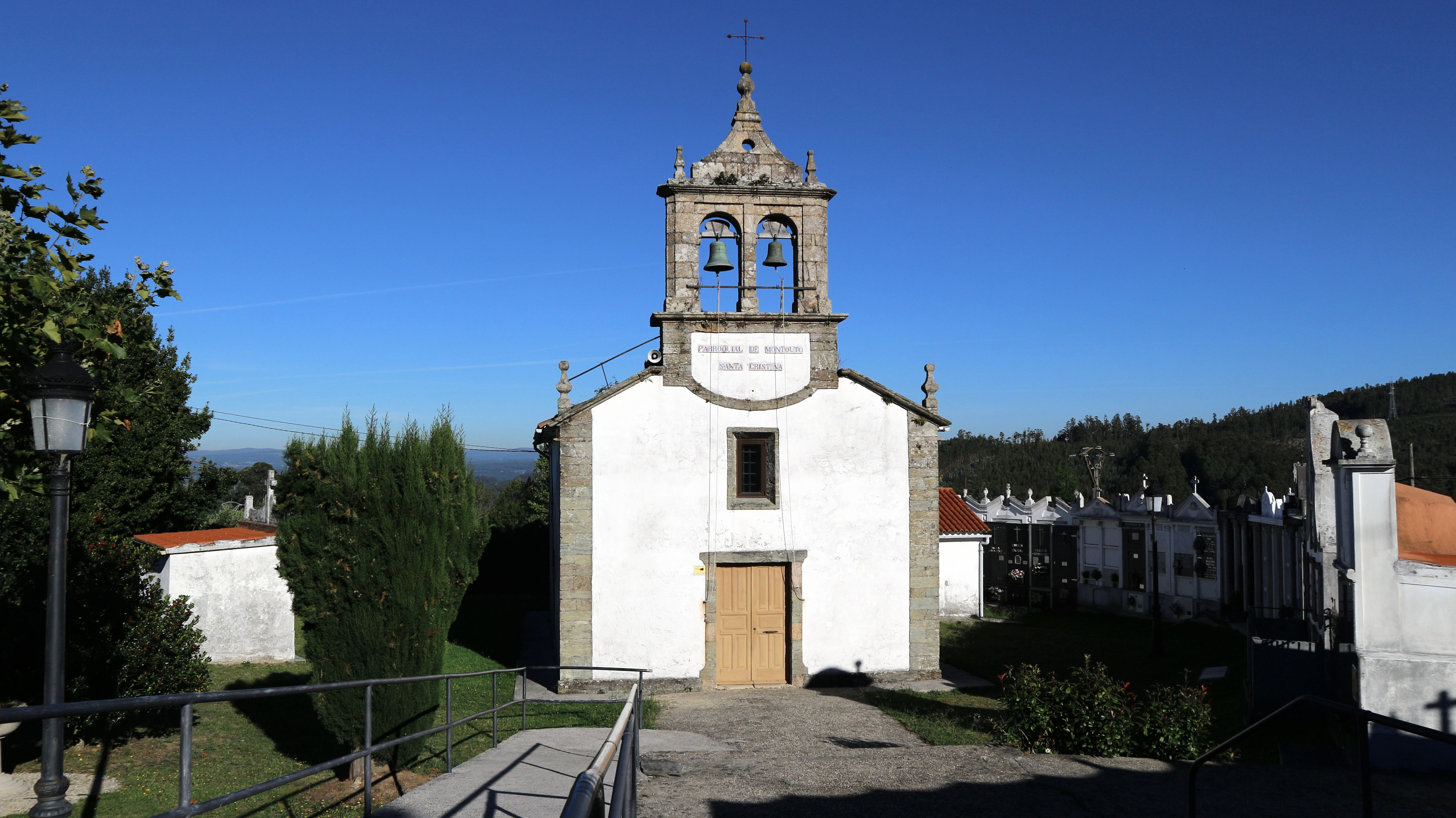 Igrexa de Santa Cristina de Montouto. No Campo do Monte, en Montouto, Abegondo.